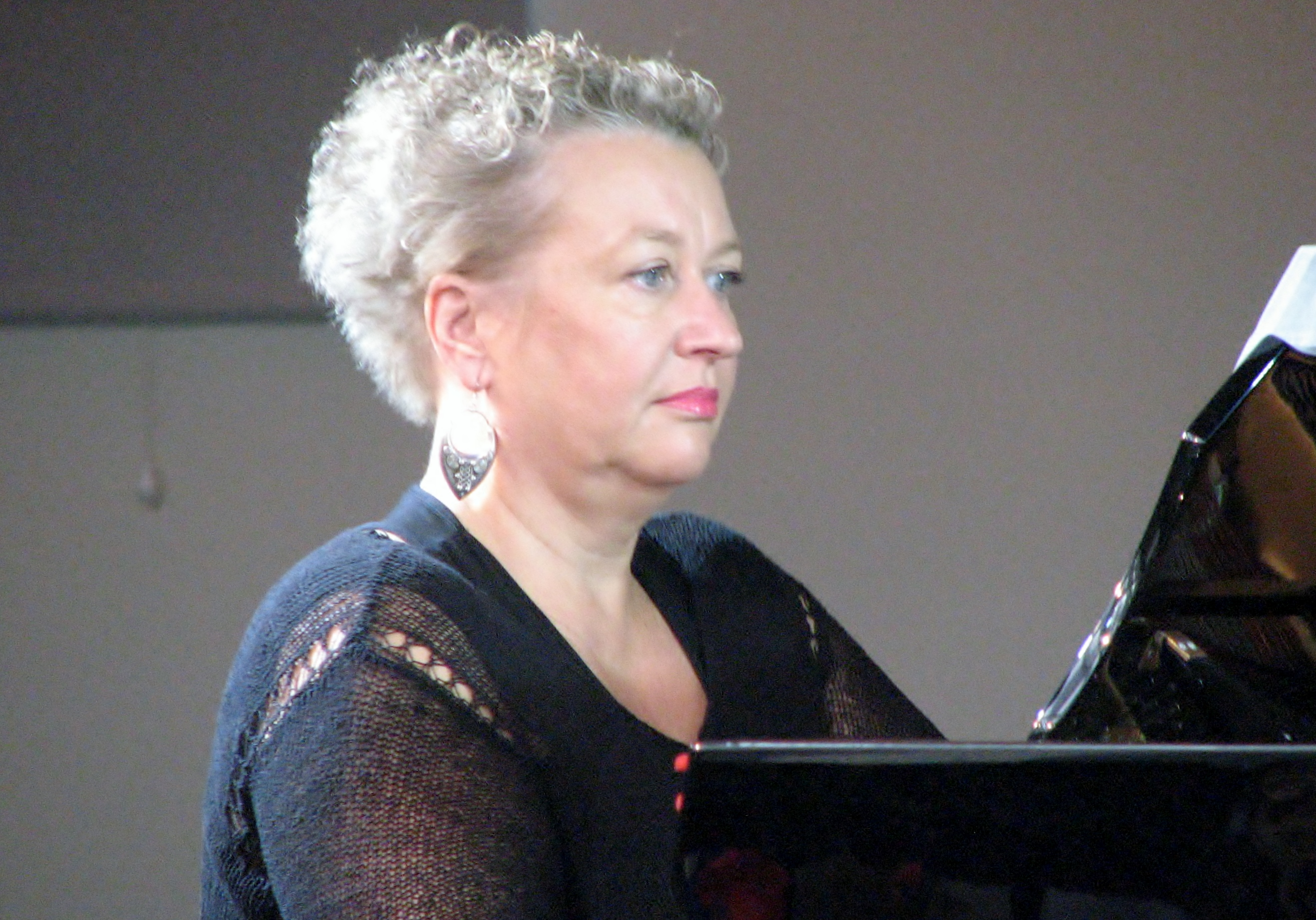 Riina Pikani Estonia maja 100 postmargi ja Schützi viiuli esitlusel klaverit mängimas